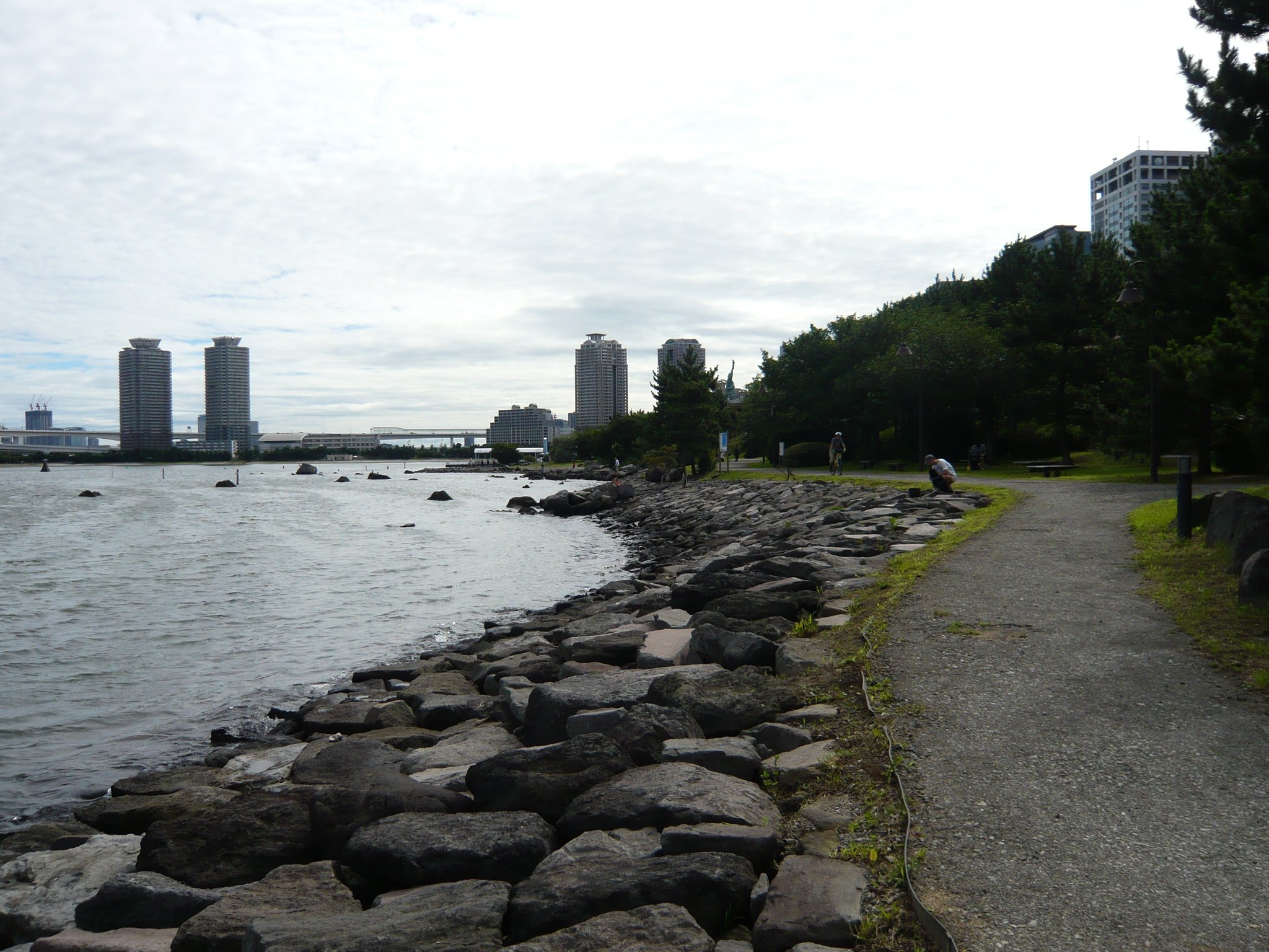 Odaiba Marine Park (odaiba kaihin kouen) in odaiba, Tokyo, Japan.